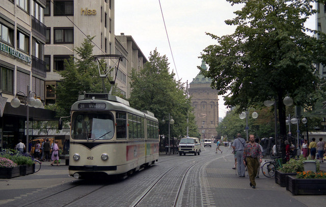 Mannheim: Tram near Wasserturm